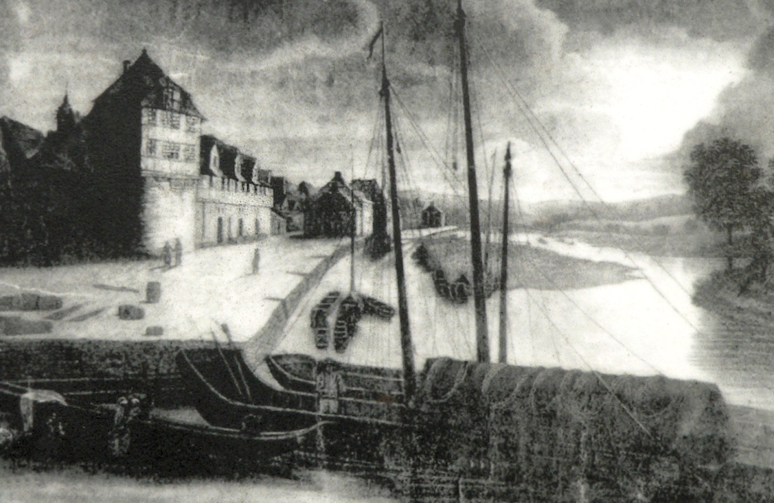 Altes Sydekum und Vorgängerbau de heutigen Alten Packhofs